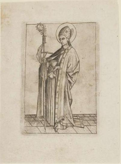 Maitre ES L.141 Saint Eloi